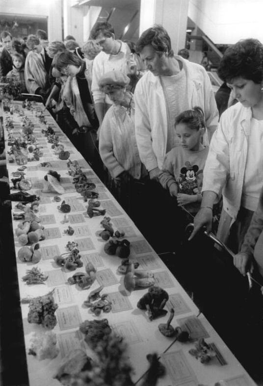 ADN-ZB Grimm-4.10.87 Berlin: Zum "Tag der Familie" hatte am Wochenende der Palast der Republik eingeladen. Interesse fand nicht nur bei passionierten Sammlern der Pilzberatungsstand in der 4. Etage des Palastes."